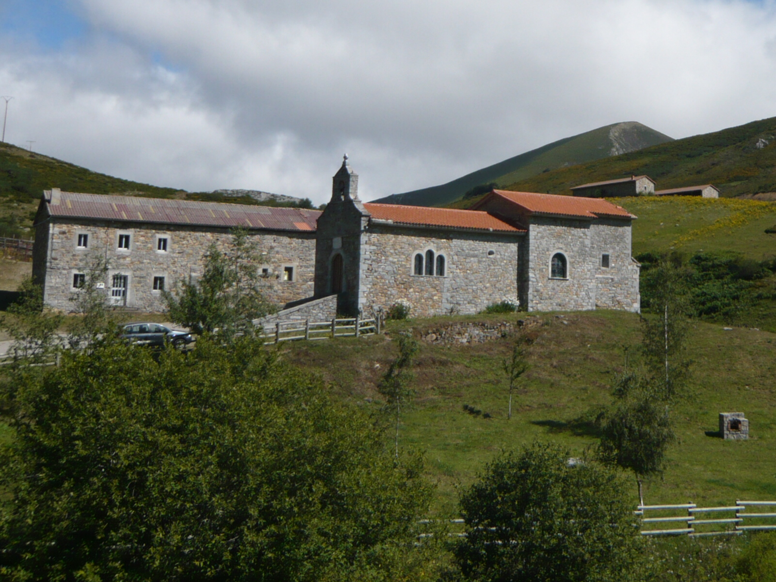 Ermita y caserío de Riosol